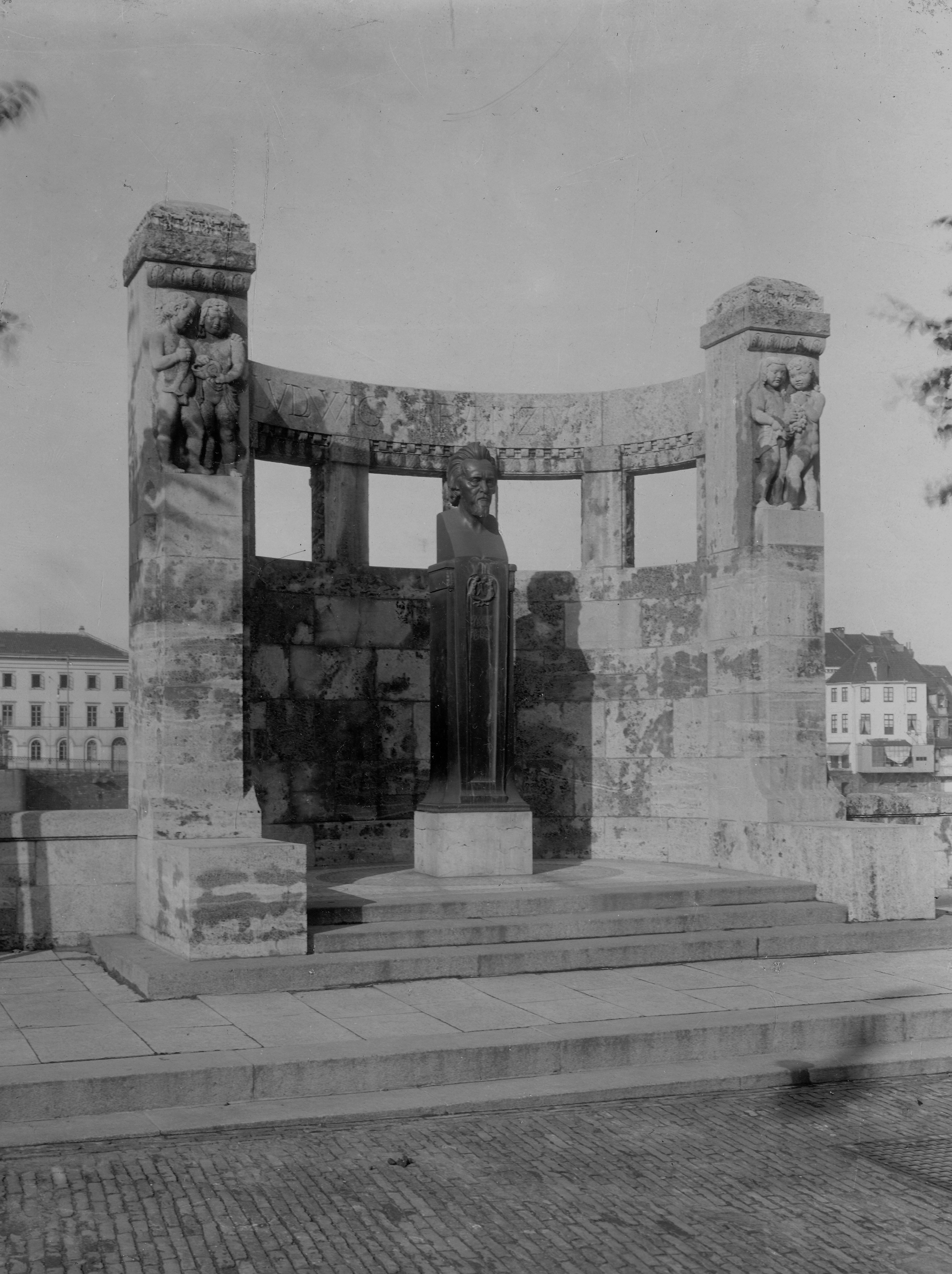 ehem. Franzius-Denkmal, Bremen, 1908. Fritz Schumacher (arch.) and Georg Roemer (sculpture).